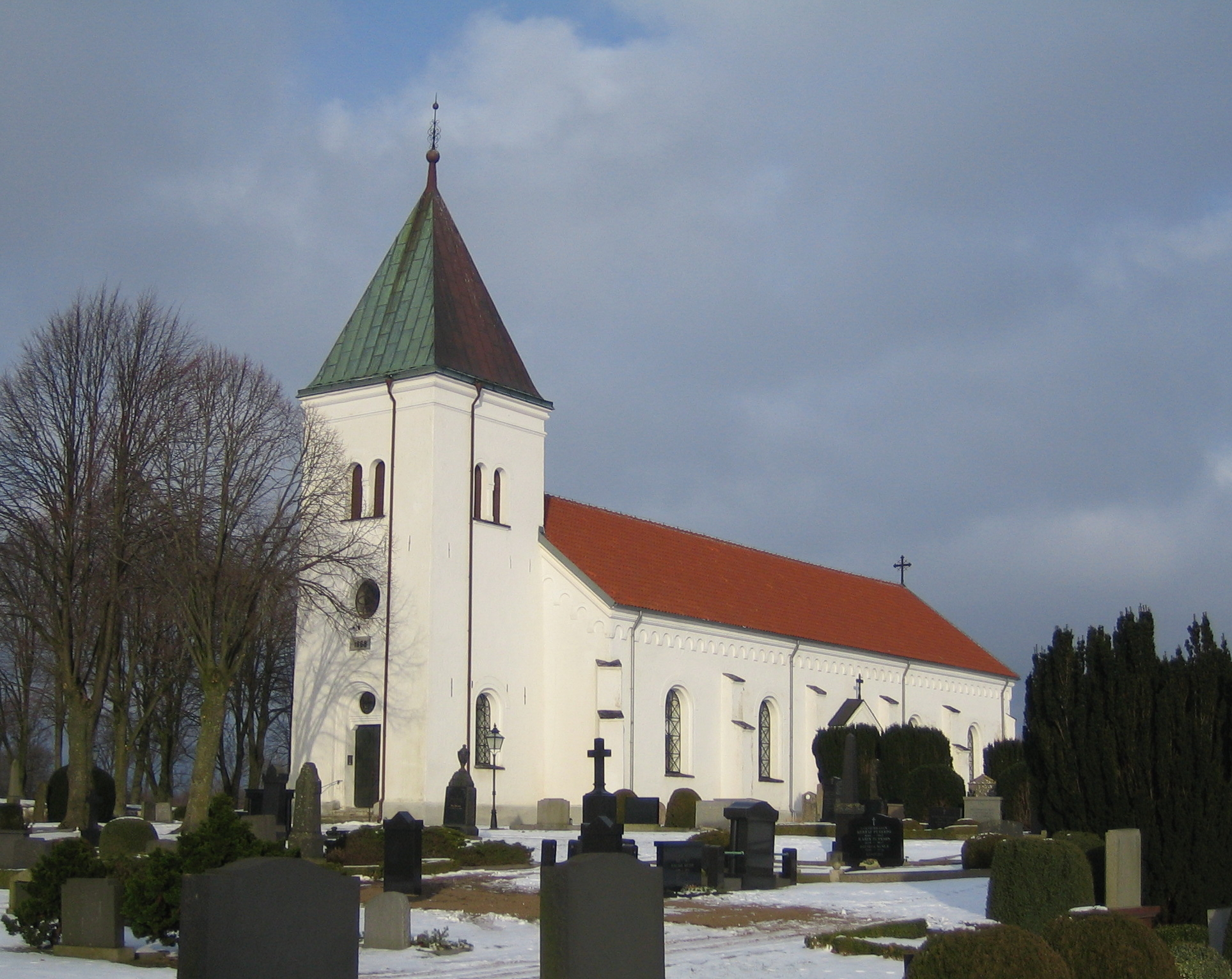 Smedstorps kyrka i Skåne